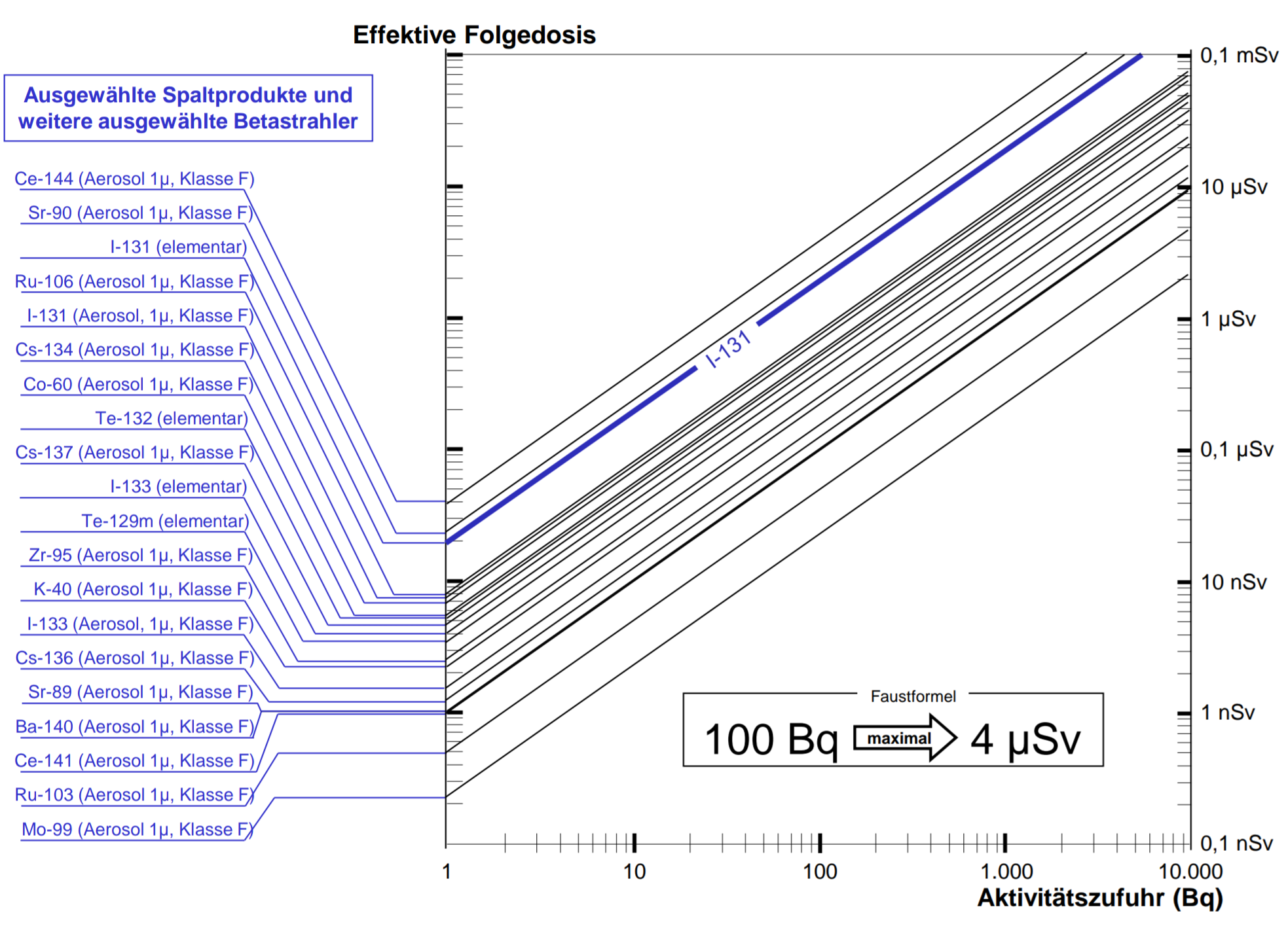 Dosisaufnahme (effektive Folgedosis) durch Inhalation ausgewählter Spaltprodukte und weiterer Betastrahler bei bekannter Aktivitätszufuhr